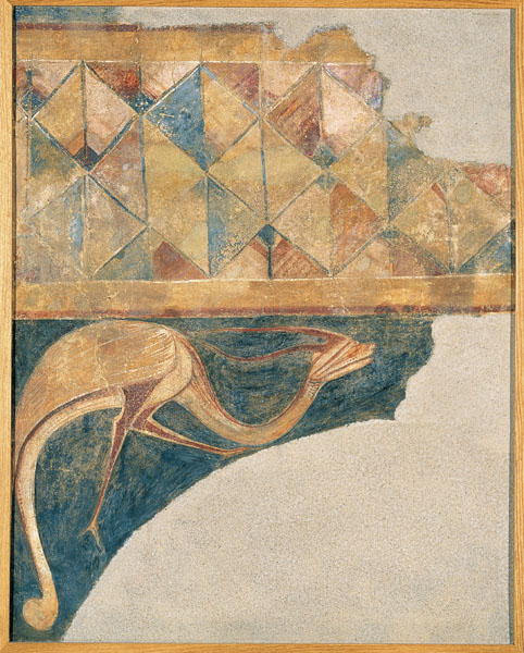 Conjunto decorativo de pinturas al fresco traspasadas a lienzo procedentes de Arlanza. Hacia 1210 conservadas en el Museo Nacional de Arte de Cataluña. Barcelona. Spain